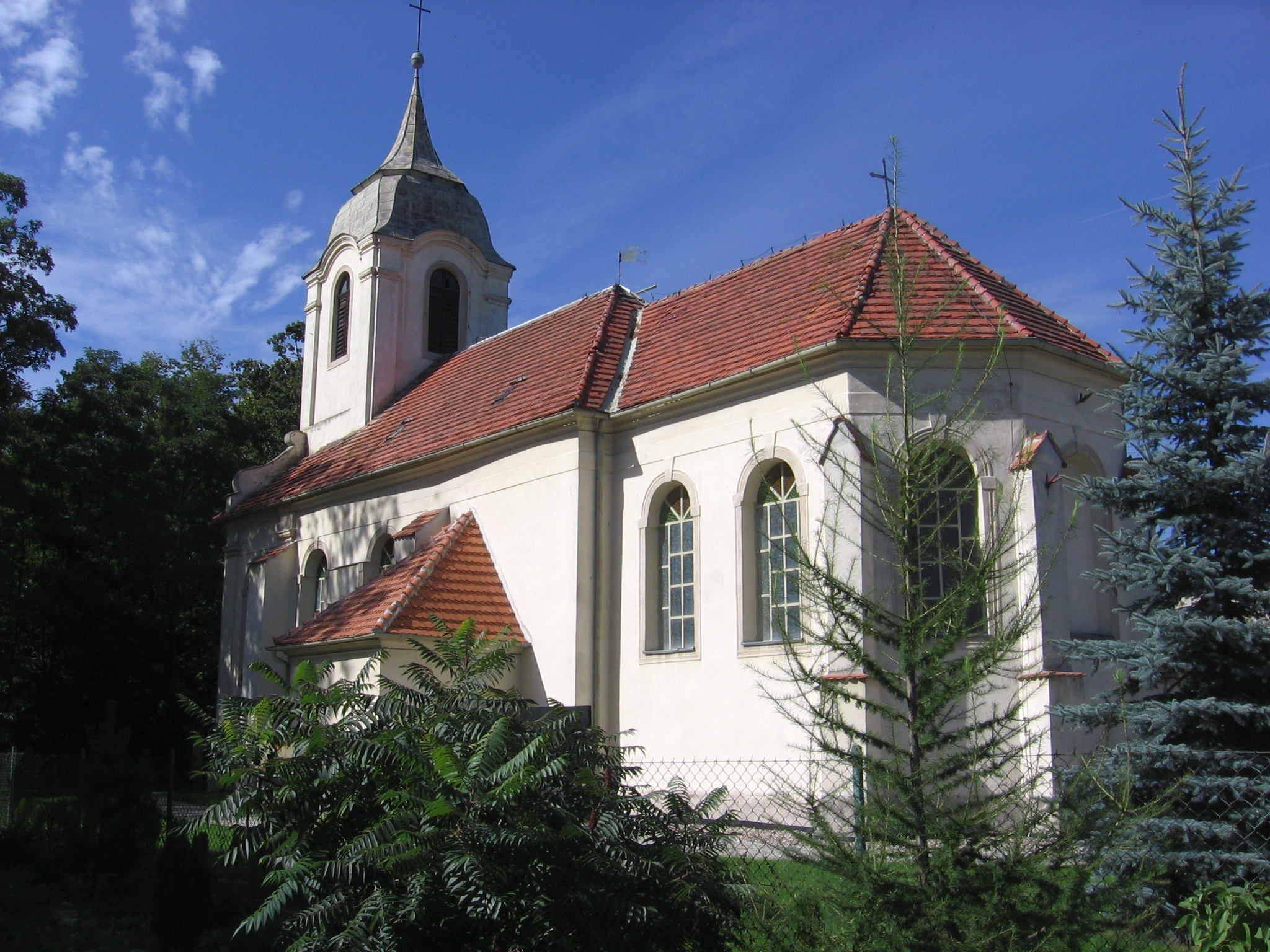 kościół we wsi Skałka koło Wrocławia